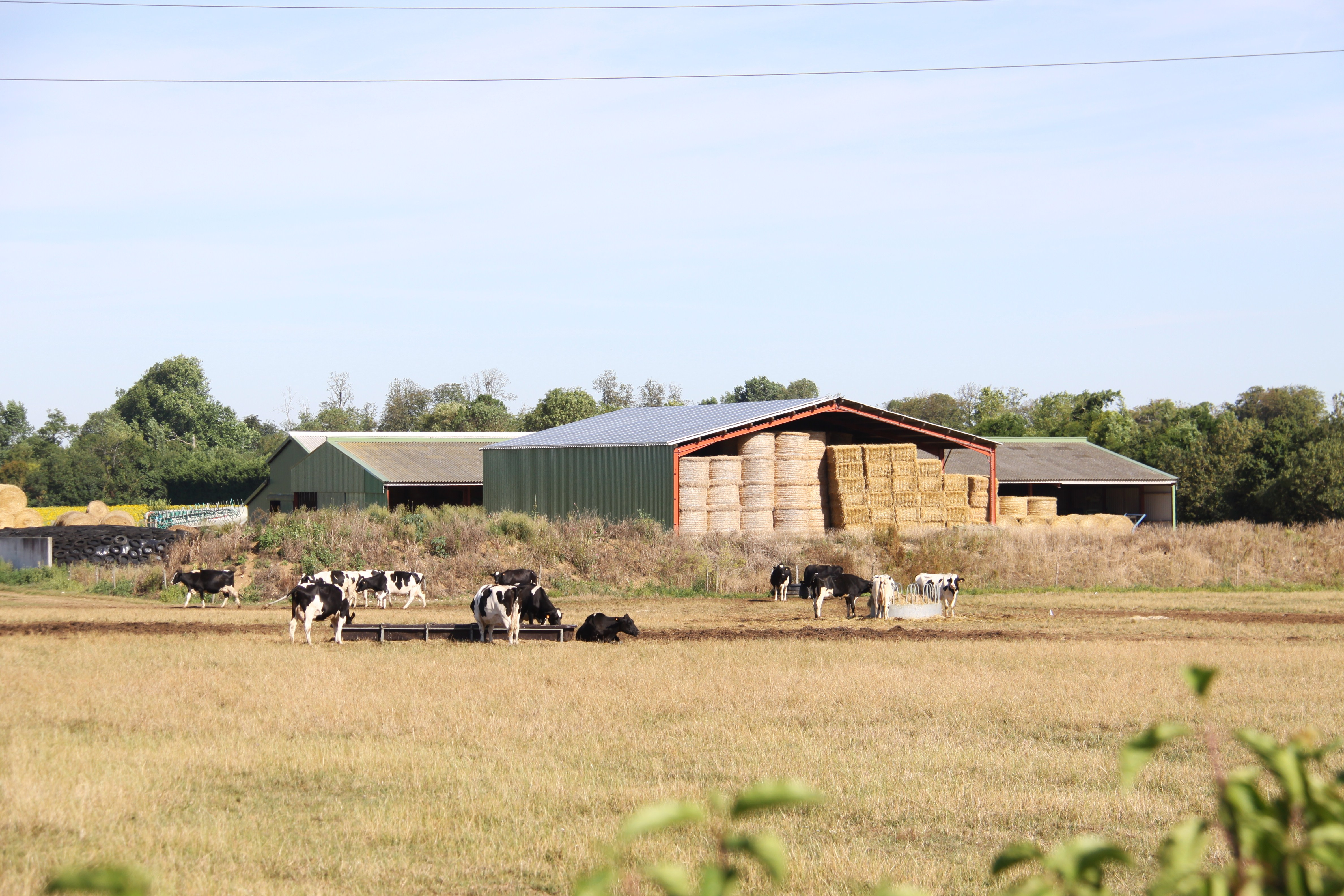 Hangars à foin de la Ferme de Gramont et vaches laitières. Ferme de Gramont, Fief des Lapins, Chemin de Bel Air, La Sauzaie, Saint-Xandre, Charente-Maritime, France.